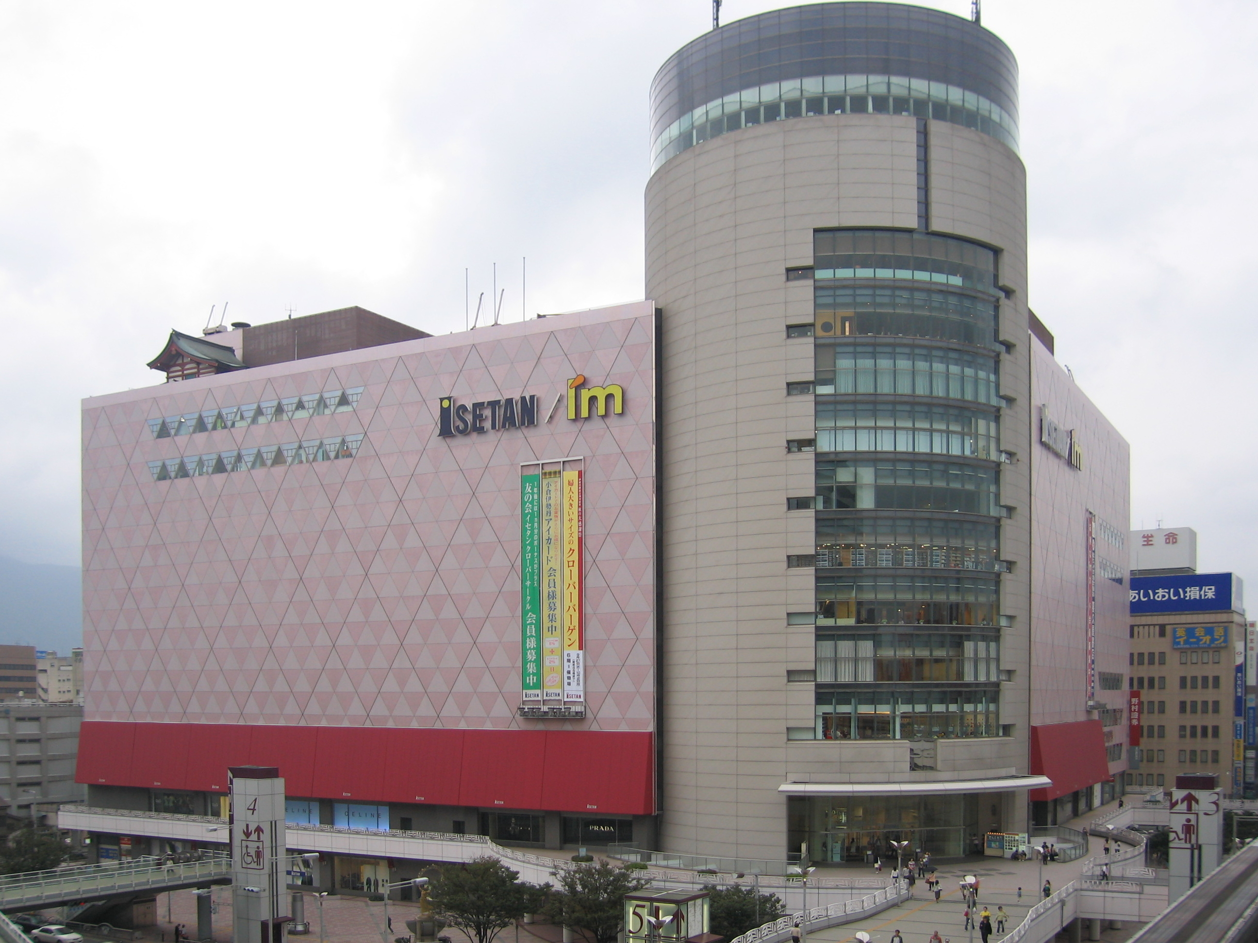 Kokura Isetan Department Store, Kitakyushu City.